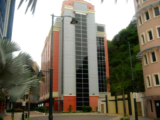 Edificio Torreón en Puerto Santa, Guayaquil